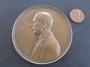 Médaille à l'effigie de Josse Allard